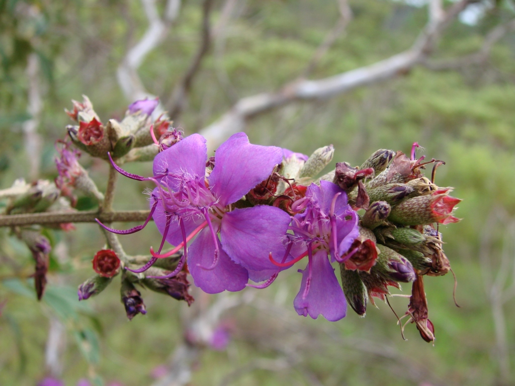 Tibouchina papyrus - MELASTOMATACEAE Parque Estadual da Serra dos Pirineus - Pirenópolis - Goiás - Brasil.